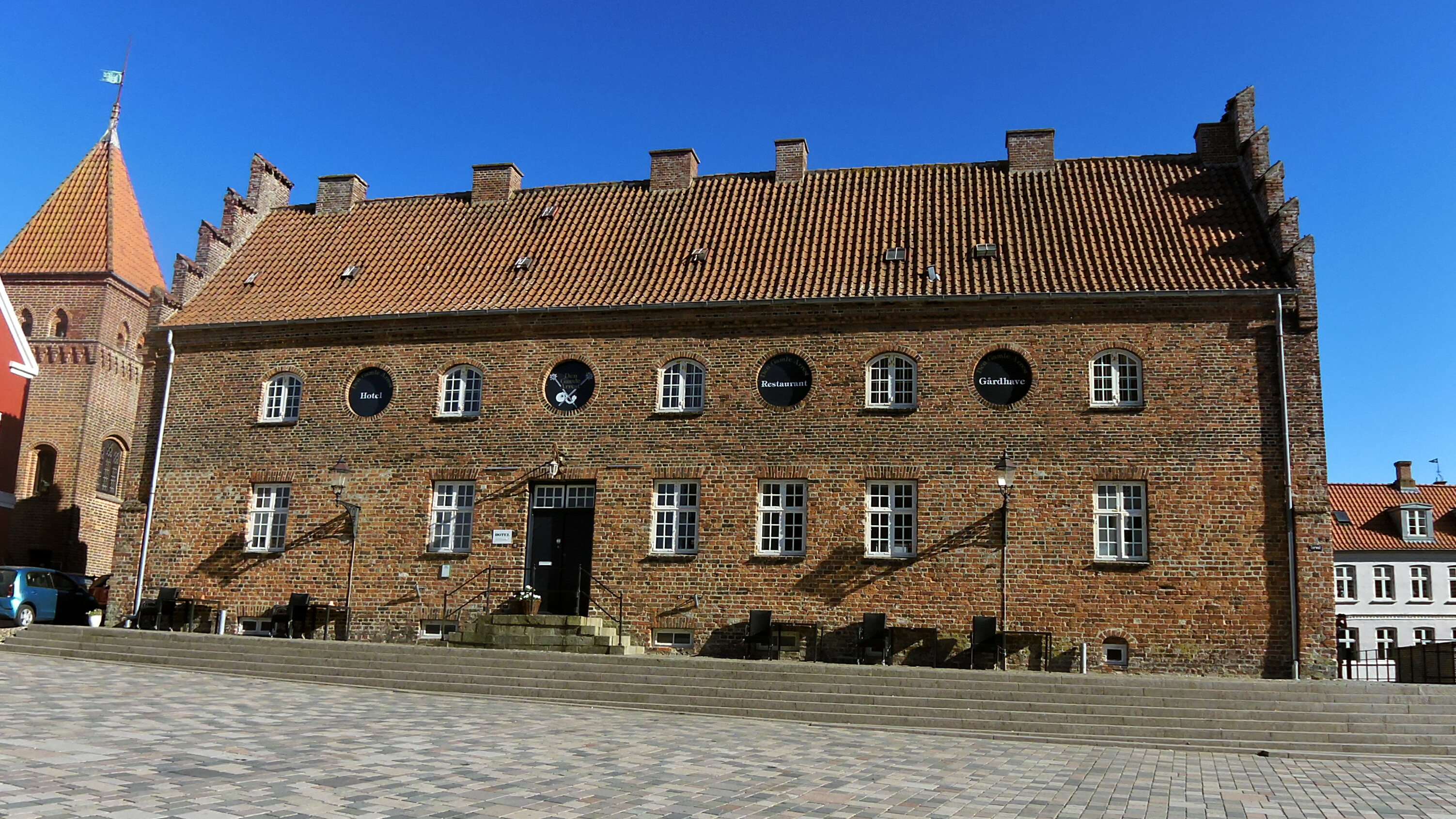 Den Gamle Arrest i Ribe